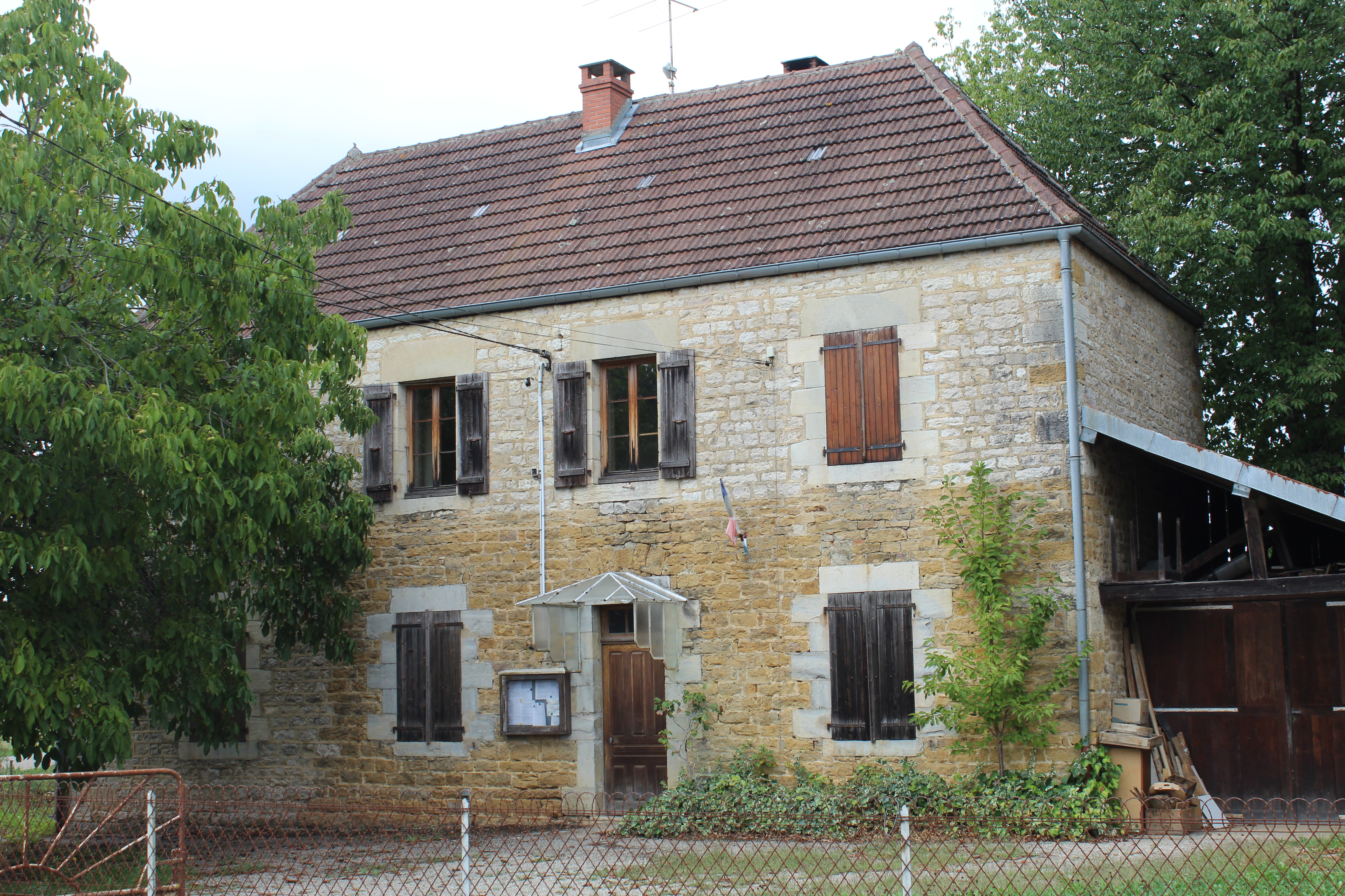 Mairie du Chateley.